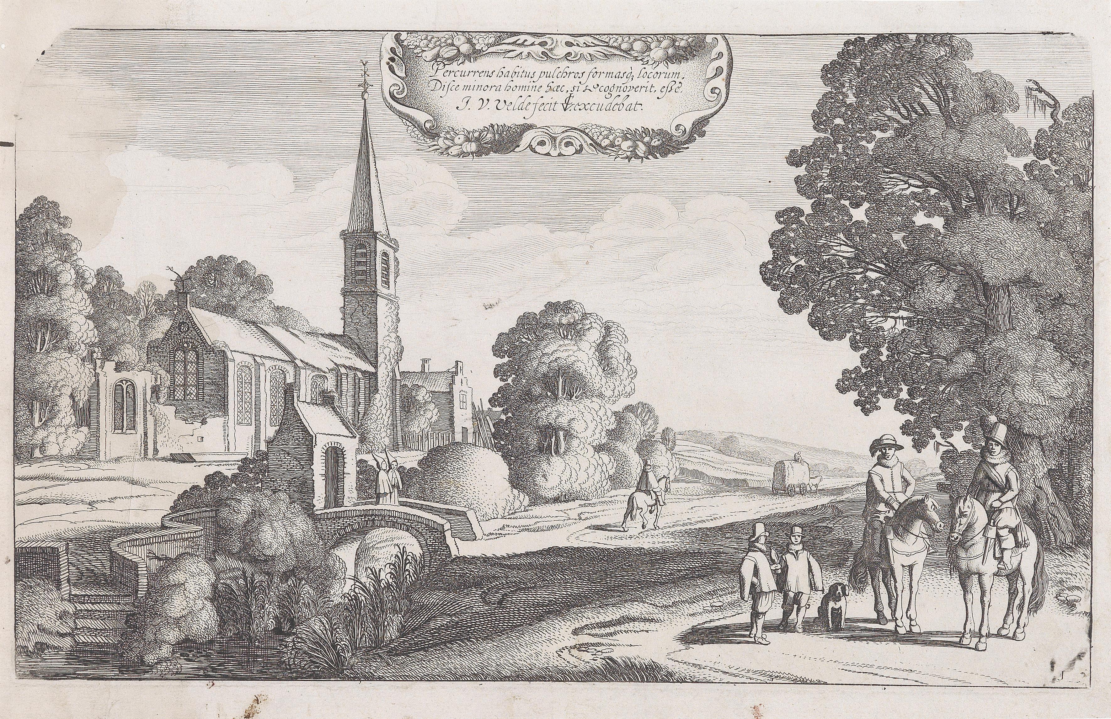 Landstraße neben einer Kirche, Radierung um 1620, nach einem Gemälde von Esaias van de Velde, auf Bütten mit Wasserzeichen "Schellenkappe", 19,2 x 31,5 cm